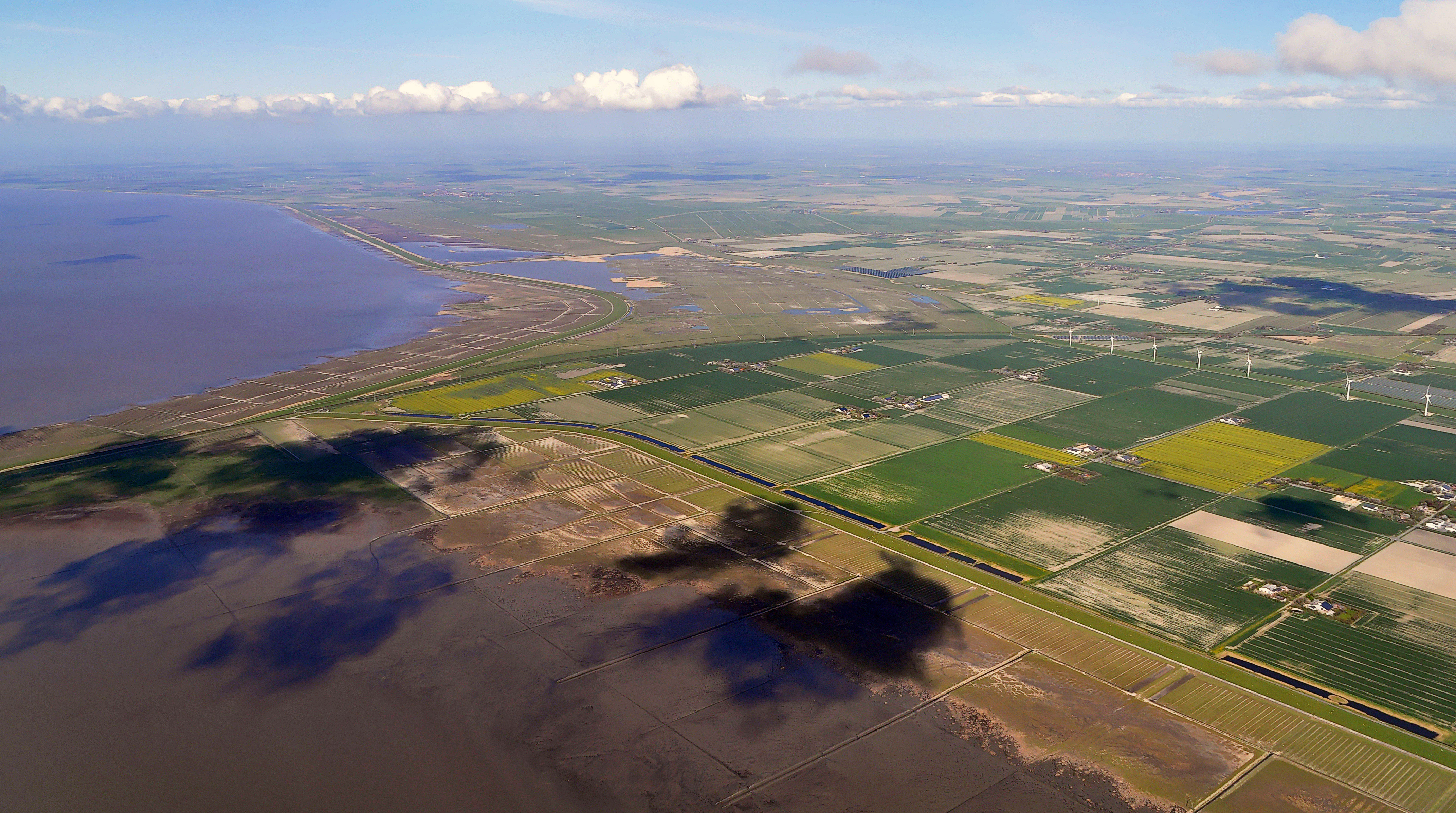 Luftbilder von der Nordseeküste 2012-05